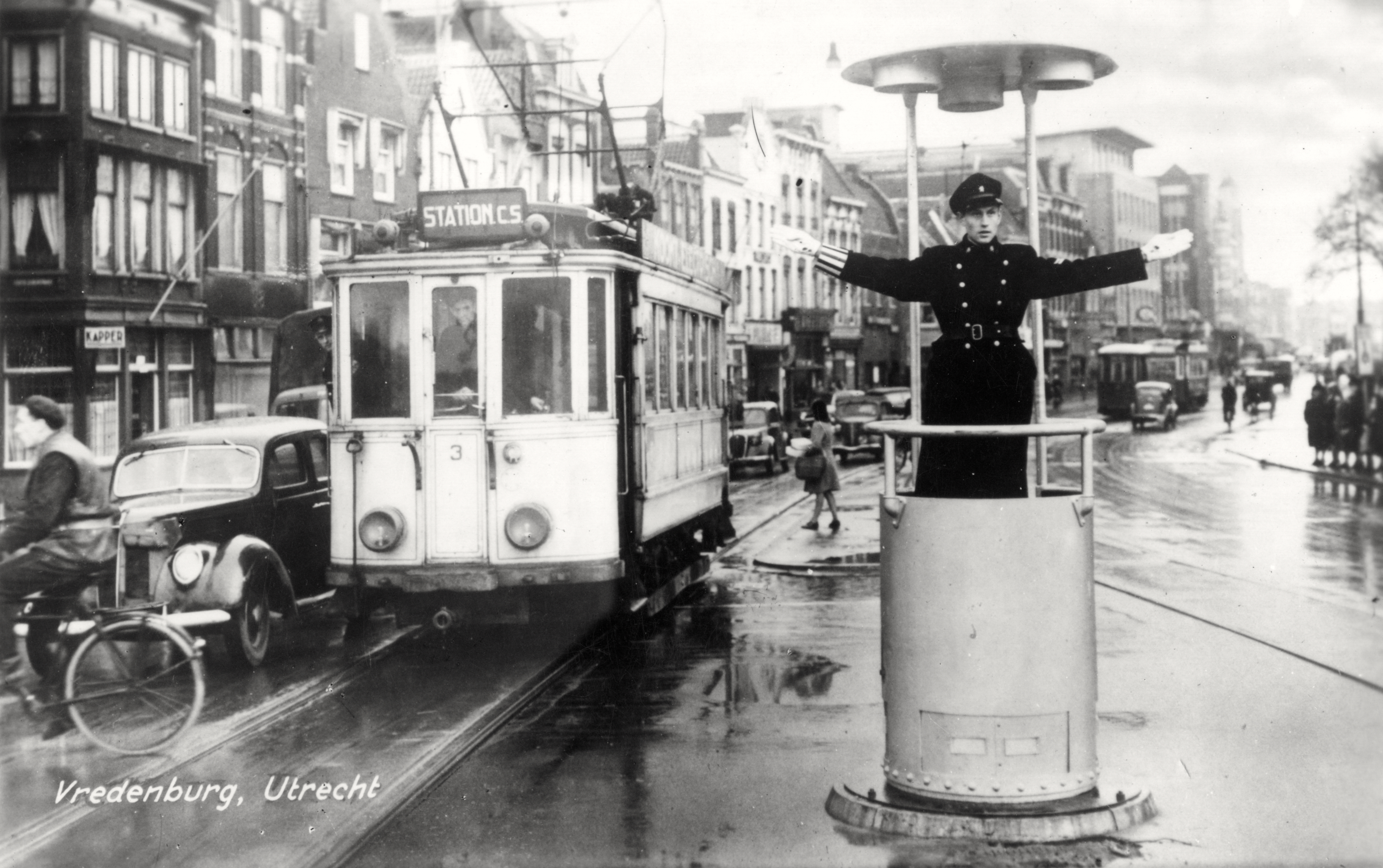 Motorwagen 3 van de NBM (ex-Vlissingen - Middelburg) op de locaaldienst Centraal Station - Biltstraat op het Vredenburg te Utrecht; circa 1946-1949. Collectie van het Utrechts Archief.